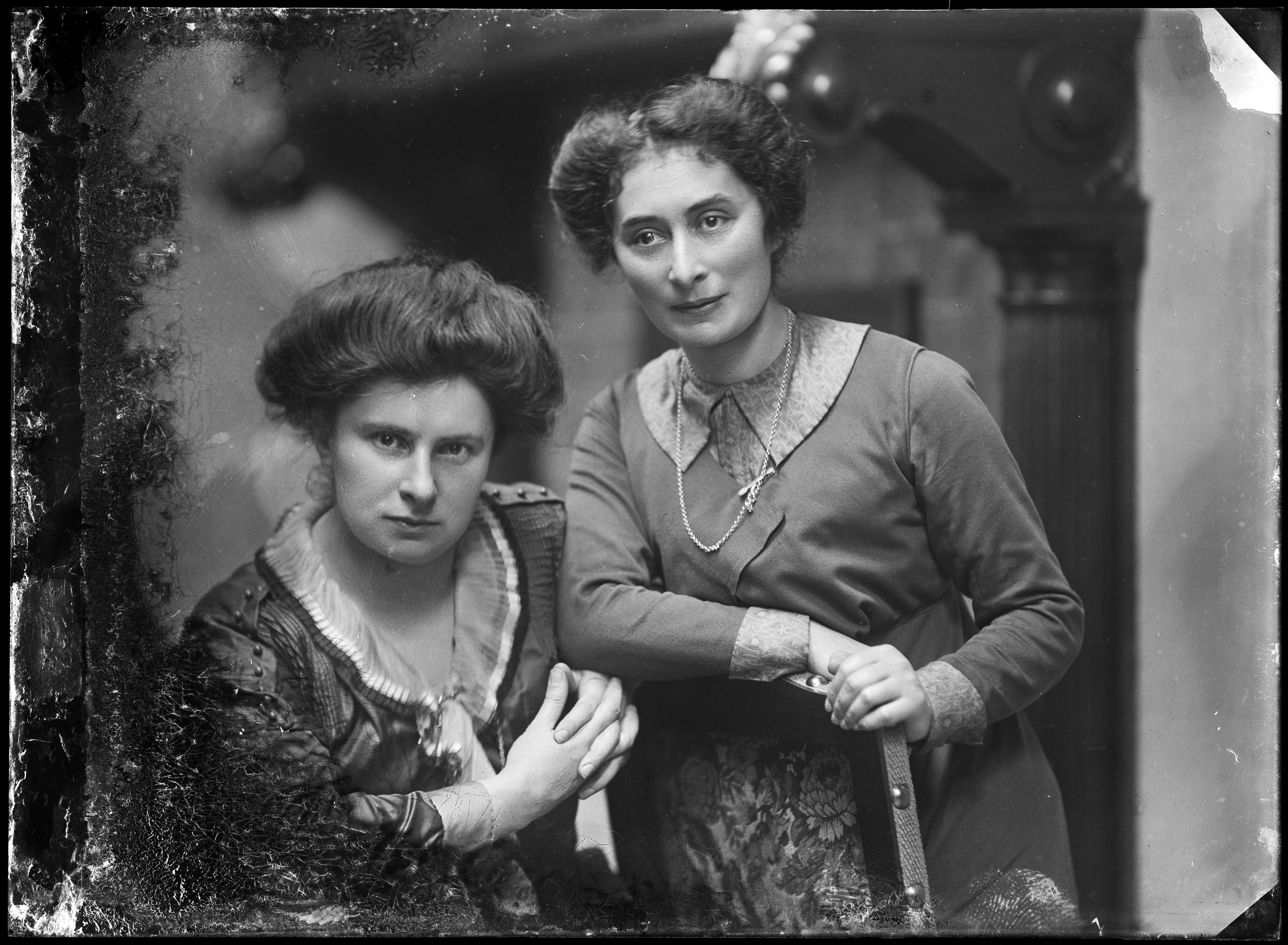 Anna Elisabeth Zuikerberg (links) en Helene van Meekren (rechts), twee van de eerste Nederlandse verslaggeefsters.